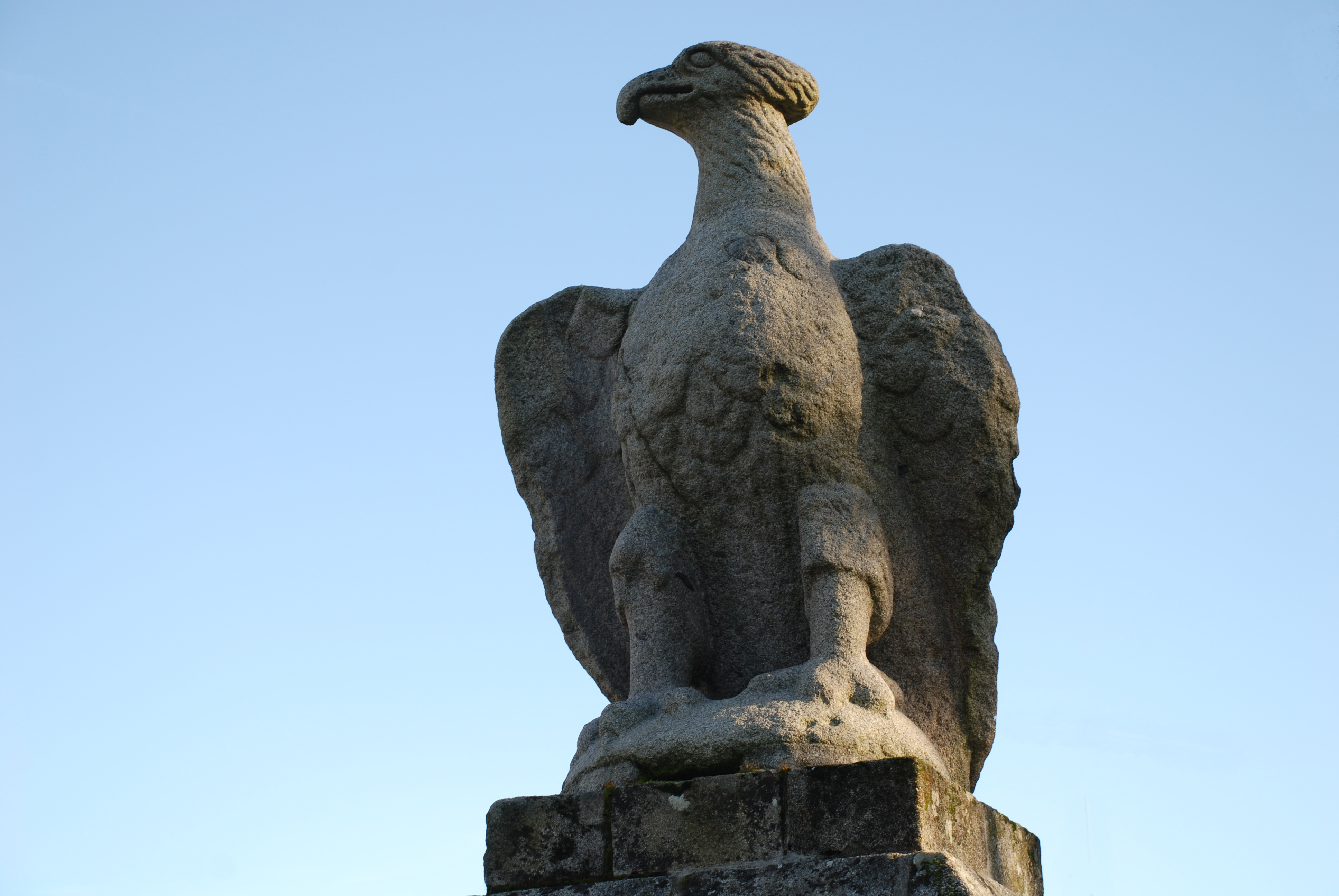 Agla romana d'Ussèl (19)